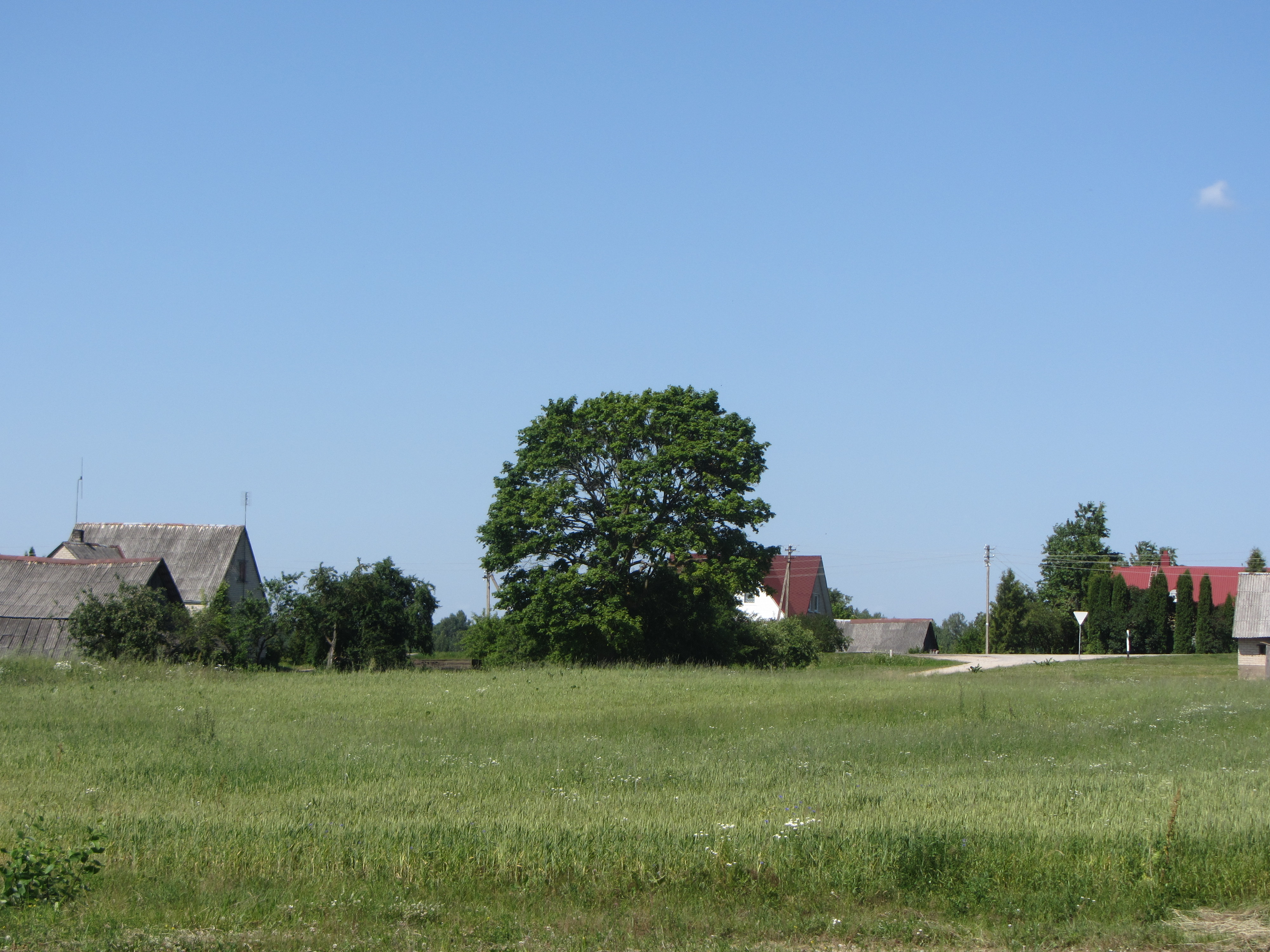 Valai, Lithuania